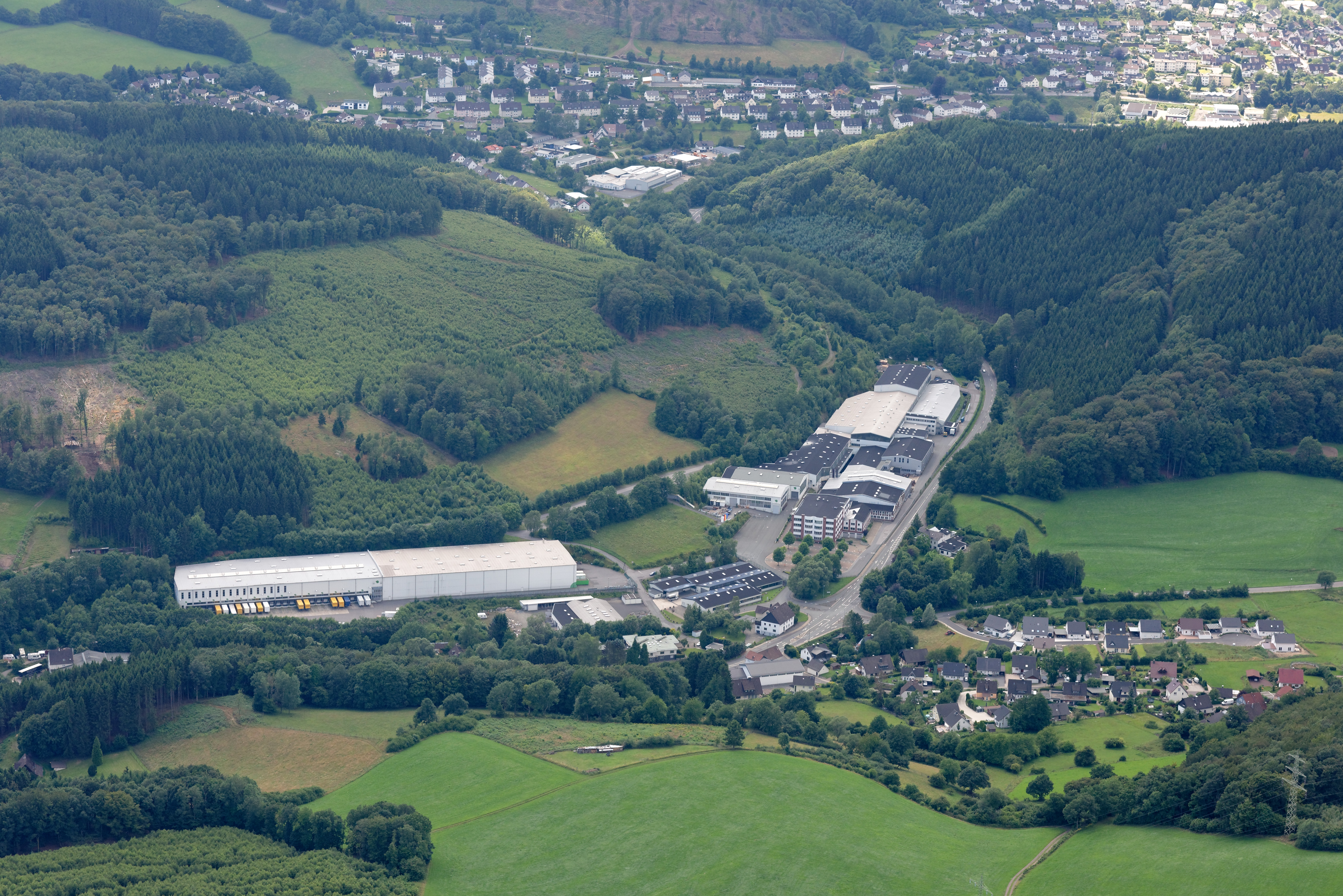 Luftaufnahme: Werksgebäude der Fa. Gustav Alberts und Kober bei Herscheid-Friedlin, Blumenthal, Heimenthal und -Grünenthal, Landesstraße 561, Nordrhein-Westfalen